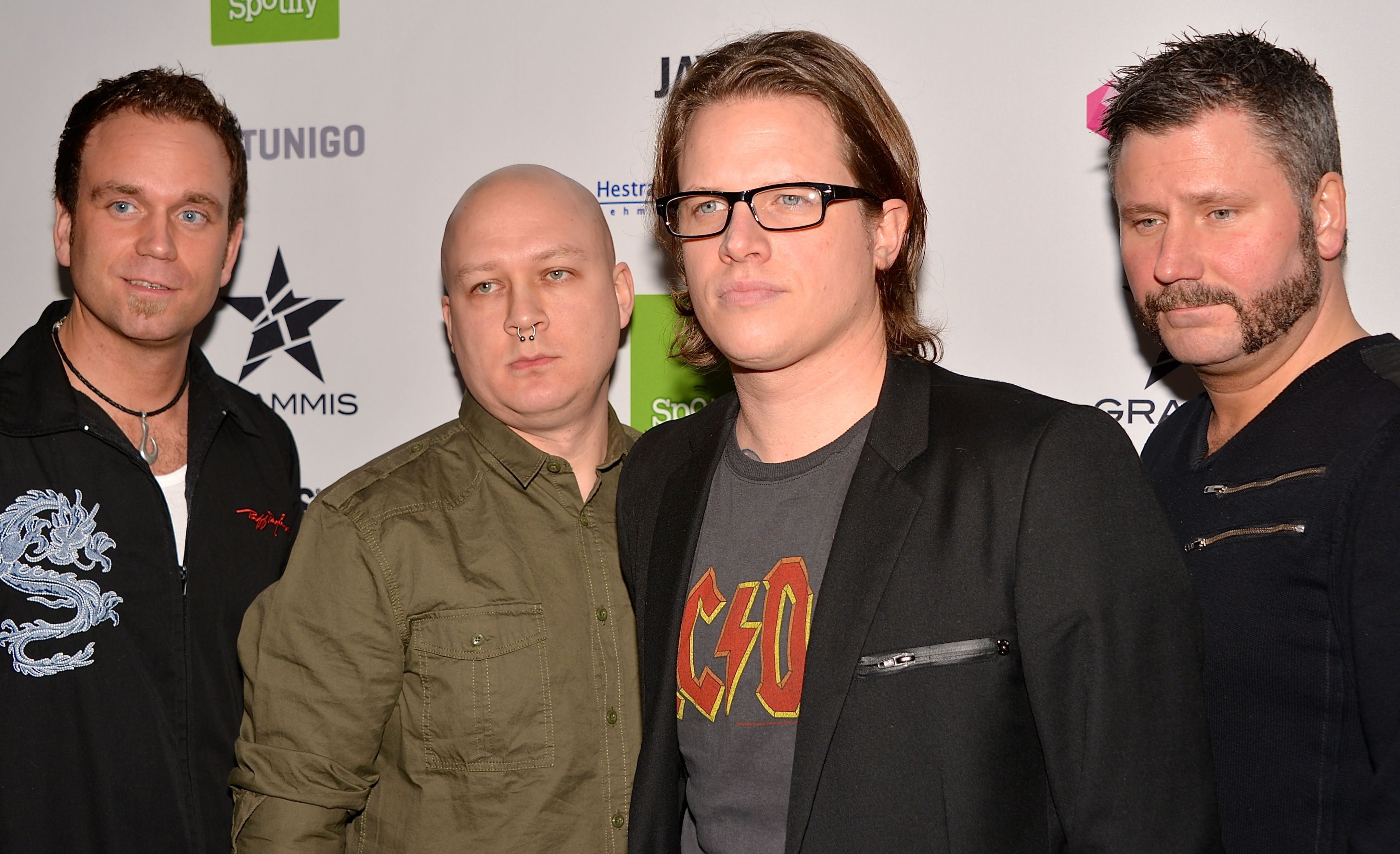 Stiftelsen på Grammisgalan på Cirkus i Stockholm den 20 februari 2013.